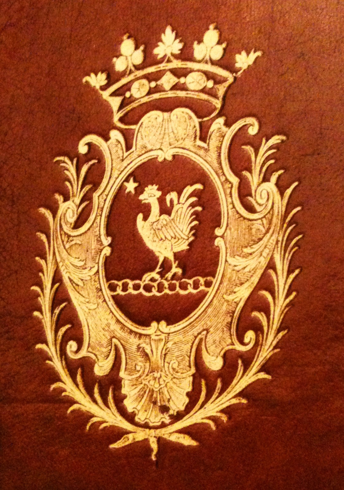 Armoiries de La Pouplinière gravées sur le premier plat d'un livre lui ayant appartenu (Tableaux..., Paris, Bonnin). Blason : Un écu de gueules à un coq d'argent crété, becqué, barbé et onglé de même, posé sur une chaîne d'or, posée en fasce, ayant la patte droite levée et regardant une étoile d'or posée à l'angle dextre du chef de l'écu.